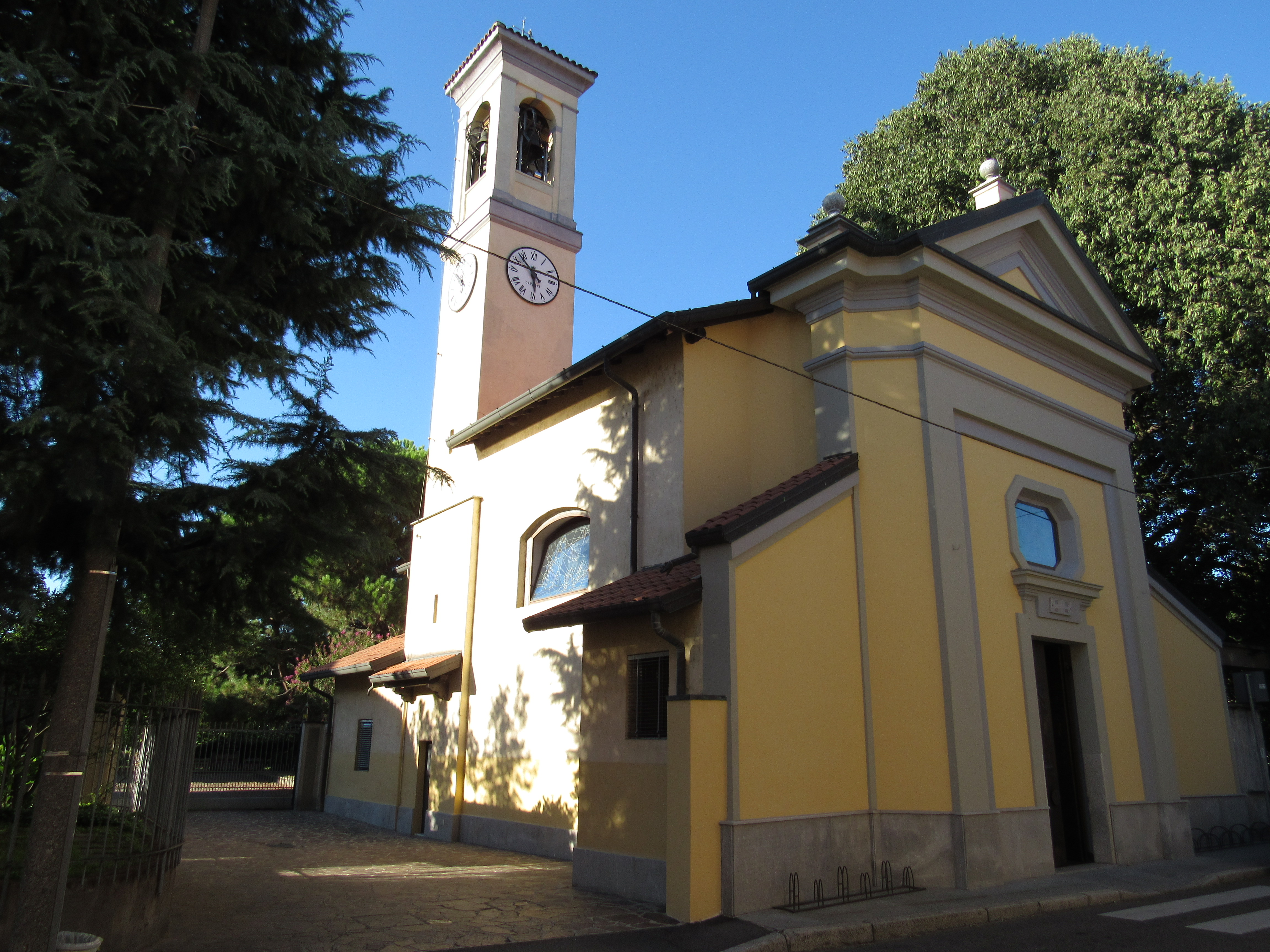 Chiesa della Madonna della Neve presso Ravello di Parabiago This is a photo of a monument which is part of cultural heritage of Italy.